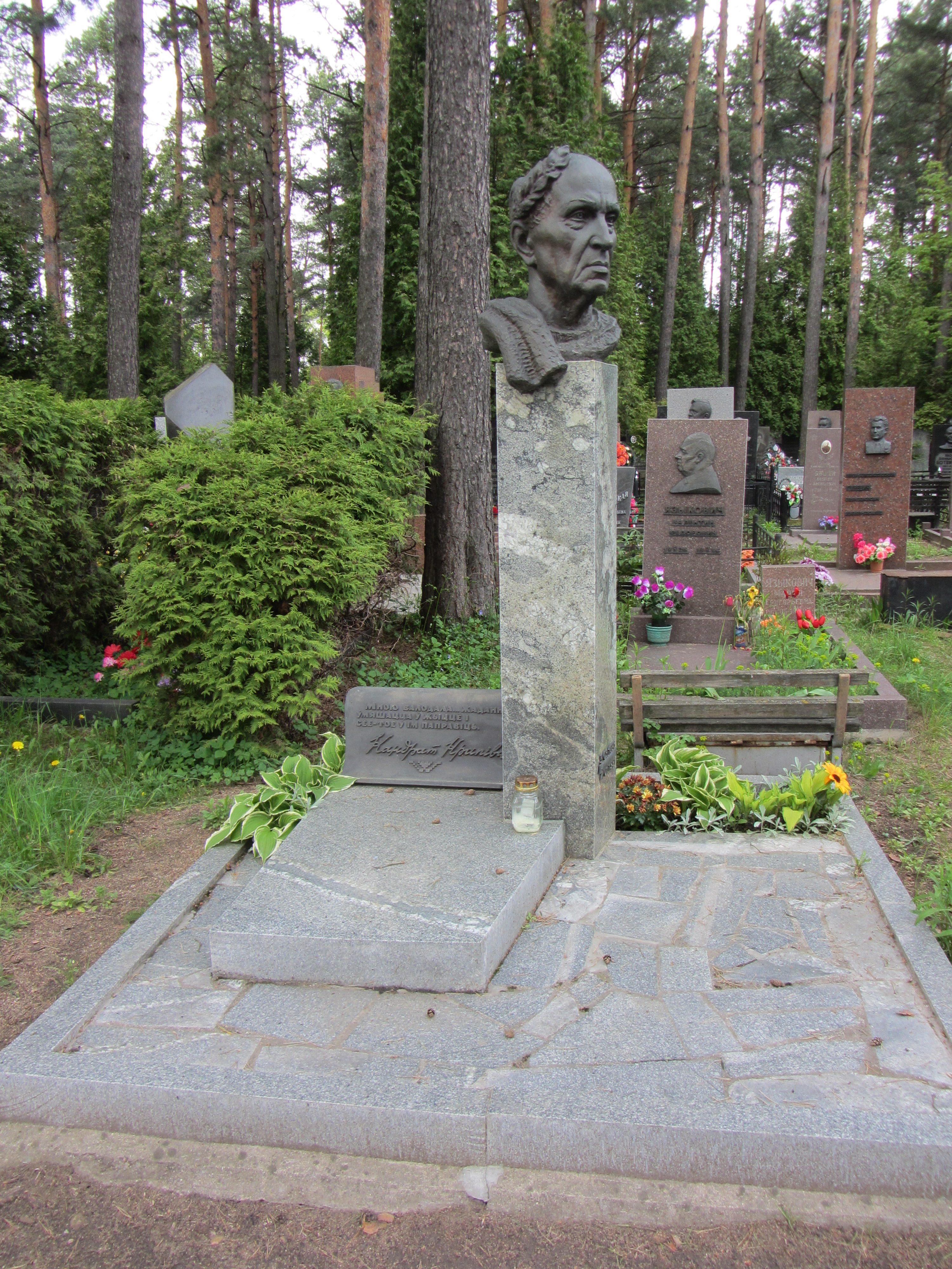 Беларуская (тарашкевіца): Магіла Кандрата Крапівы на Ўсходніх могілках